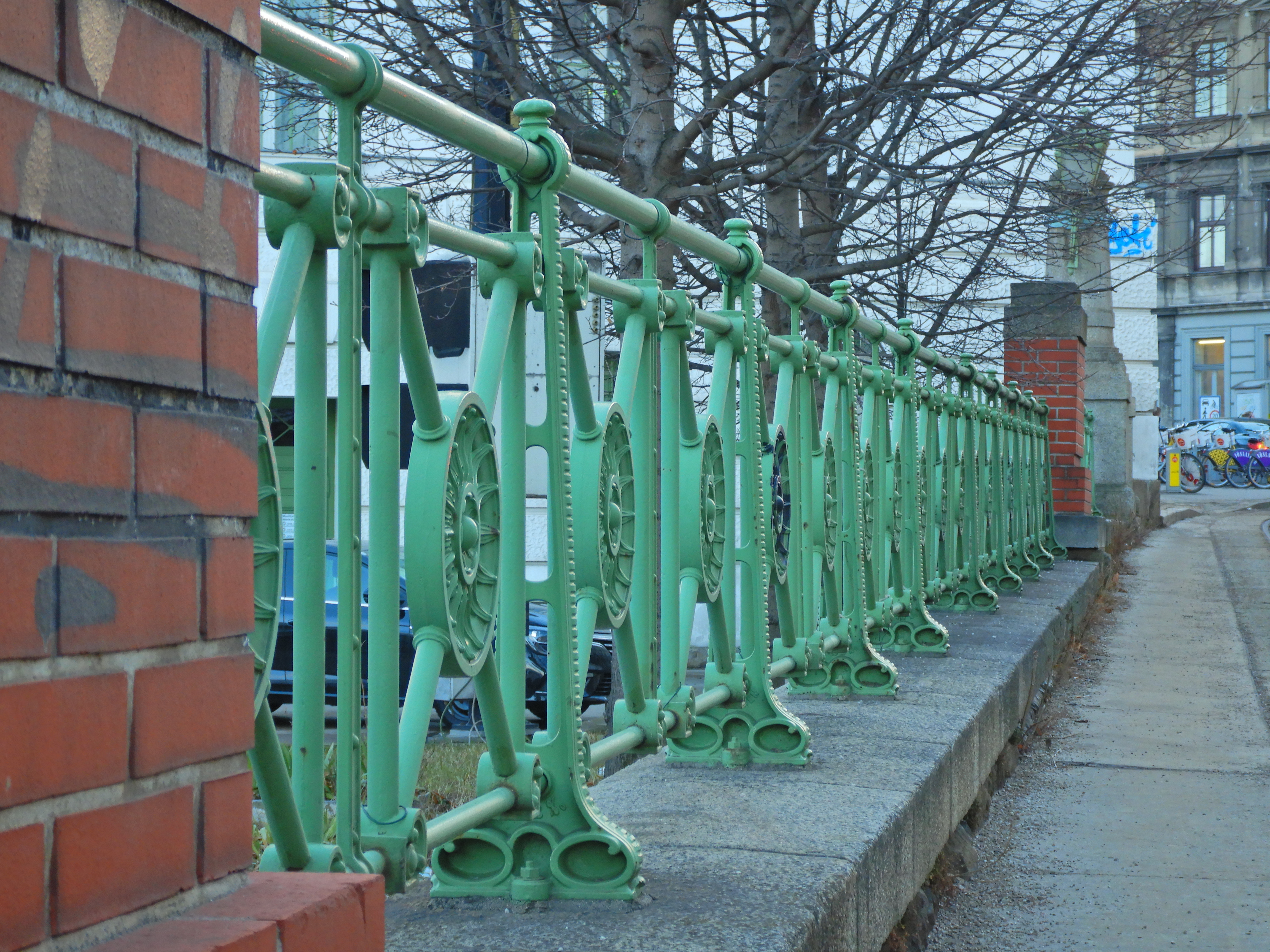 Wiener Stadtbahn-Gitter